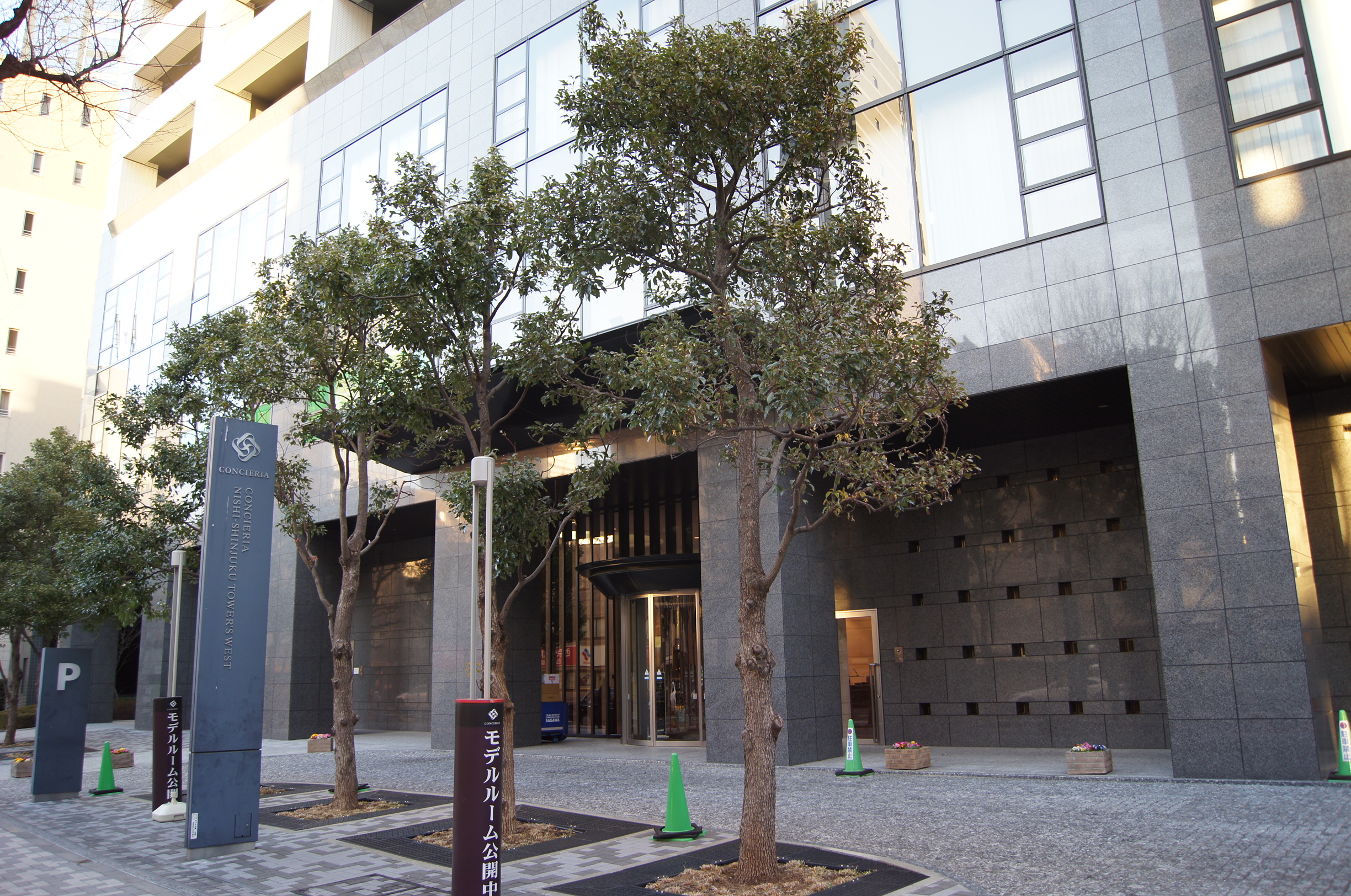 新宿区西新宿6丁目にあるコンシェリア西新宿 TOWER'S WESTのエントランス